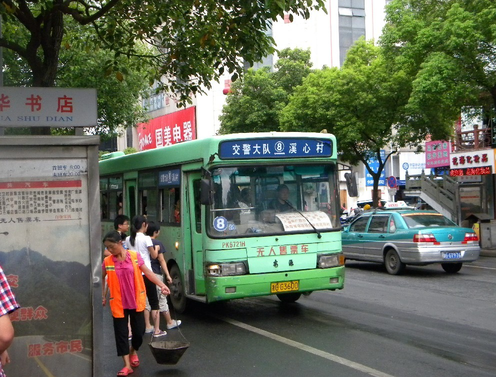 中国浙江省永康市8路公交车（车型PK6721H），停靠在新华书店站